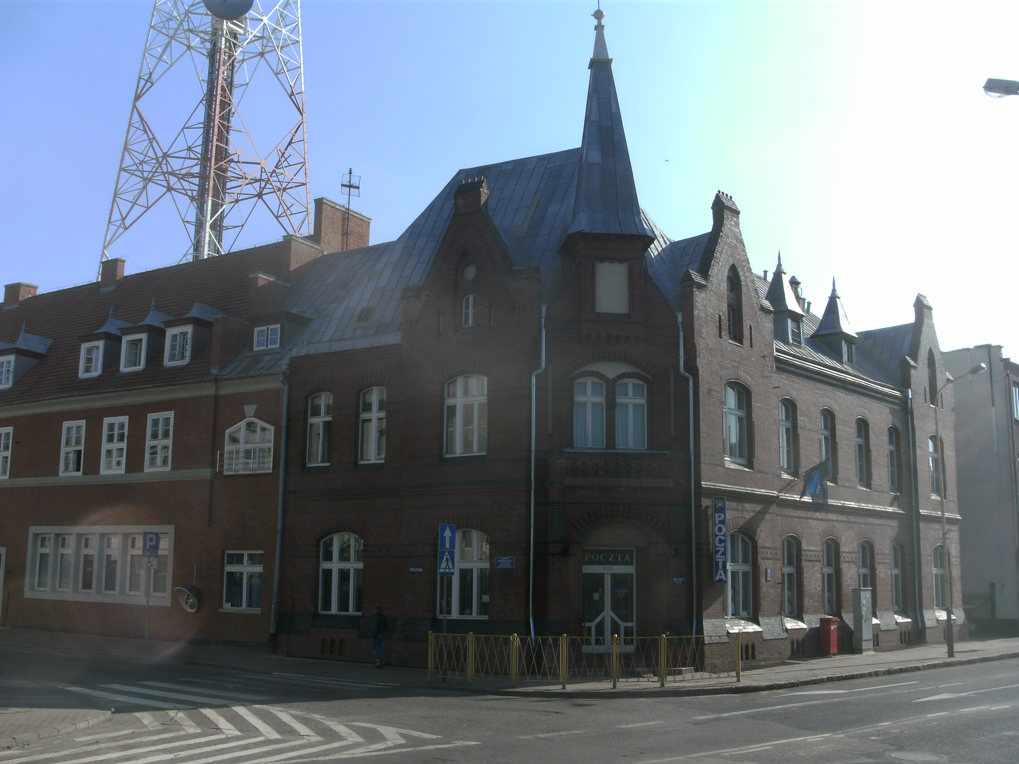 Gollnow in Hinterpommern, Altes Postamt